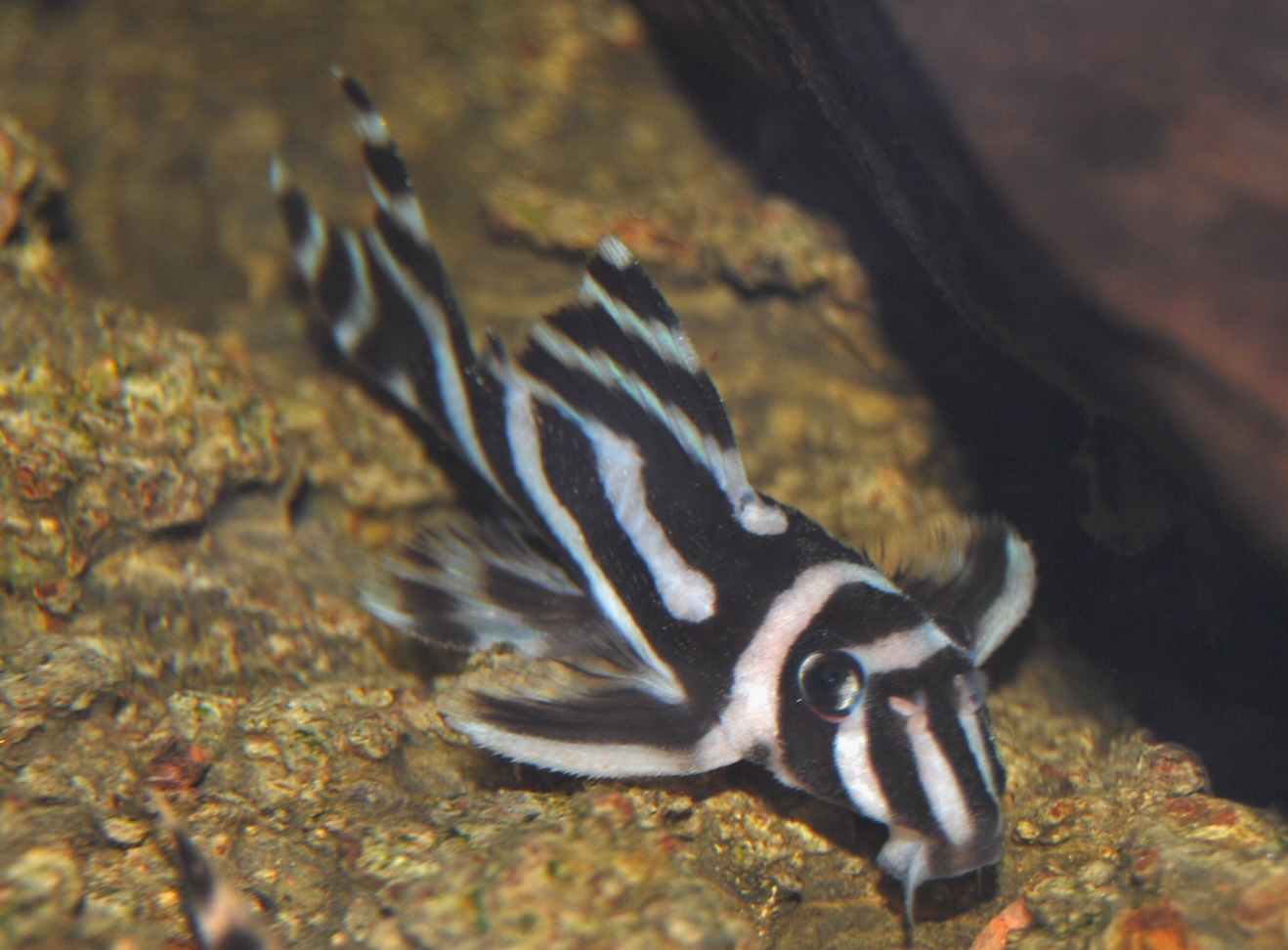 Ungfisk av L-046 (Hypancistrus zebra) - Juvenile L-046 (Hypancistrus zebra)